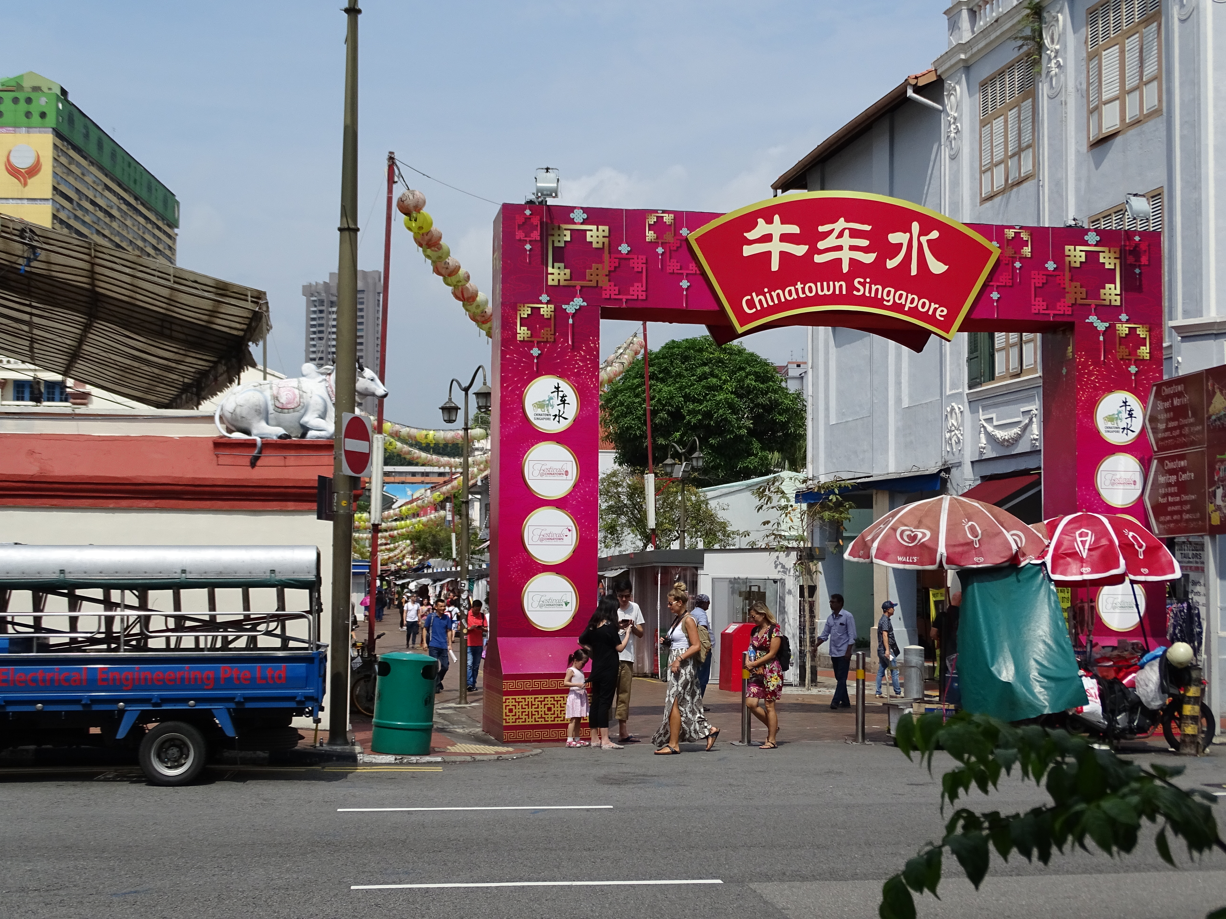 Eingang zum Chinatown / Pagoda Street, gleich neben dem Sri Mariamman Temple, Singapur